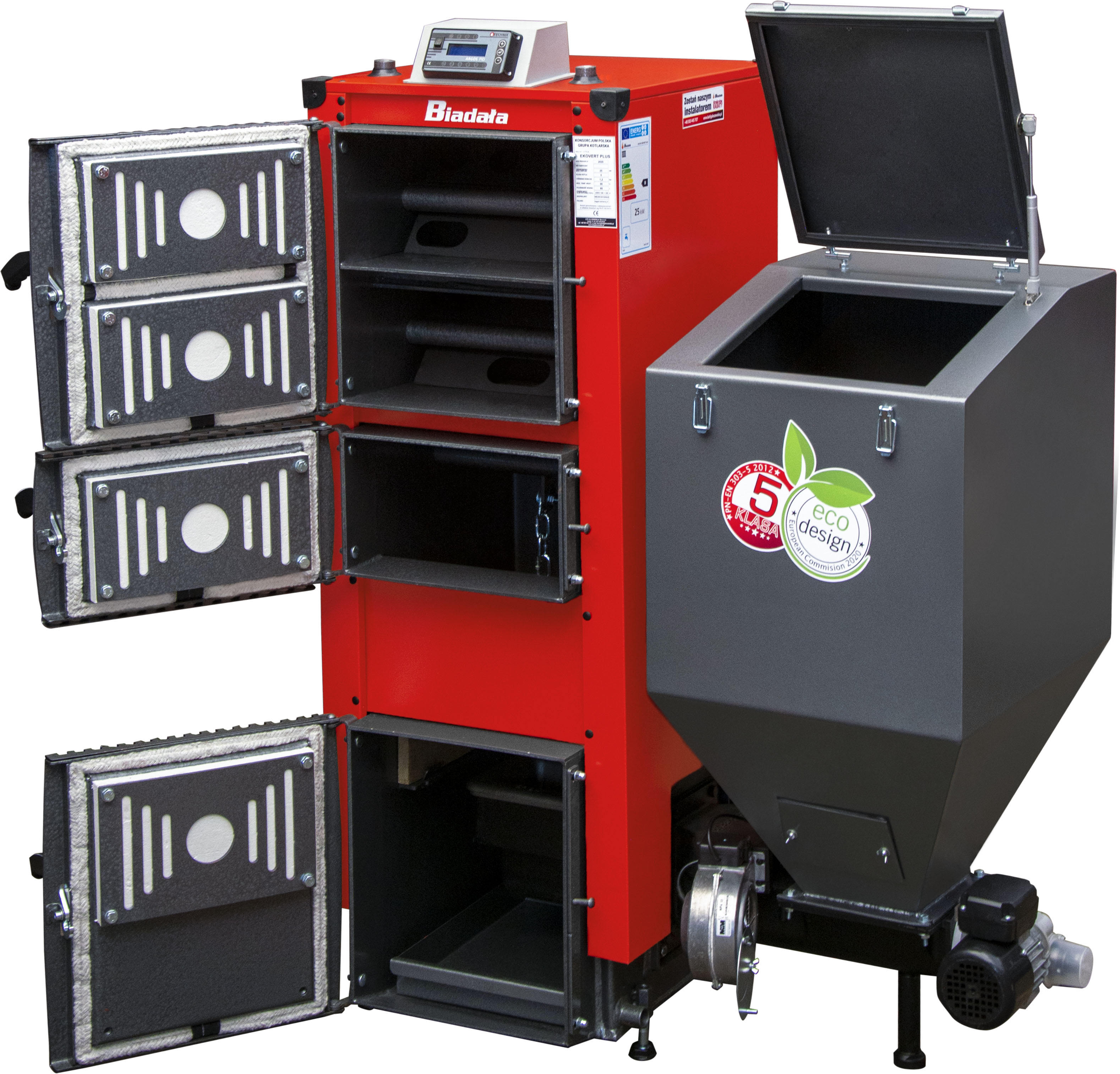 Współczesny Kocioł Ekovert Plus z certyfikatami 5 klasy i ecodesign